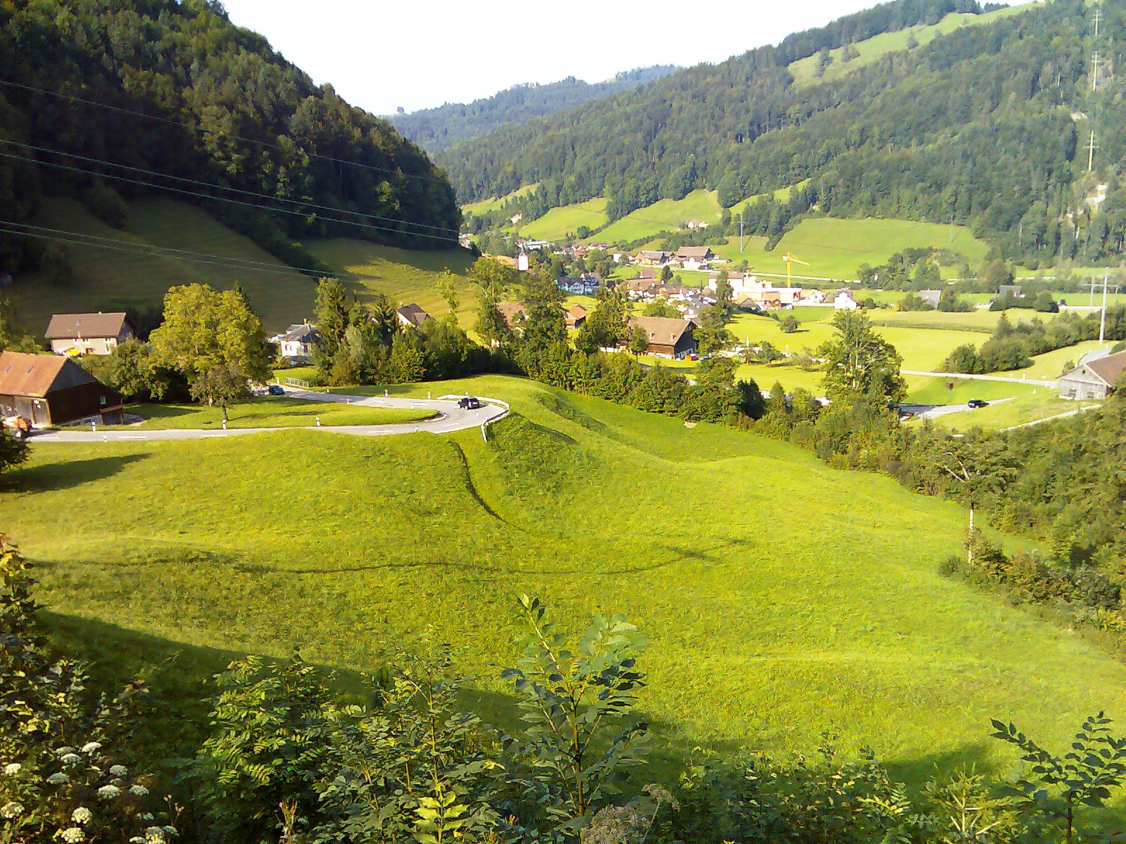 En Blick, vo de Strooss i d Wasserflue ufe, abi is Neckertal uf Brunodere.